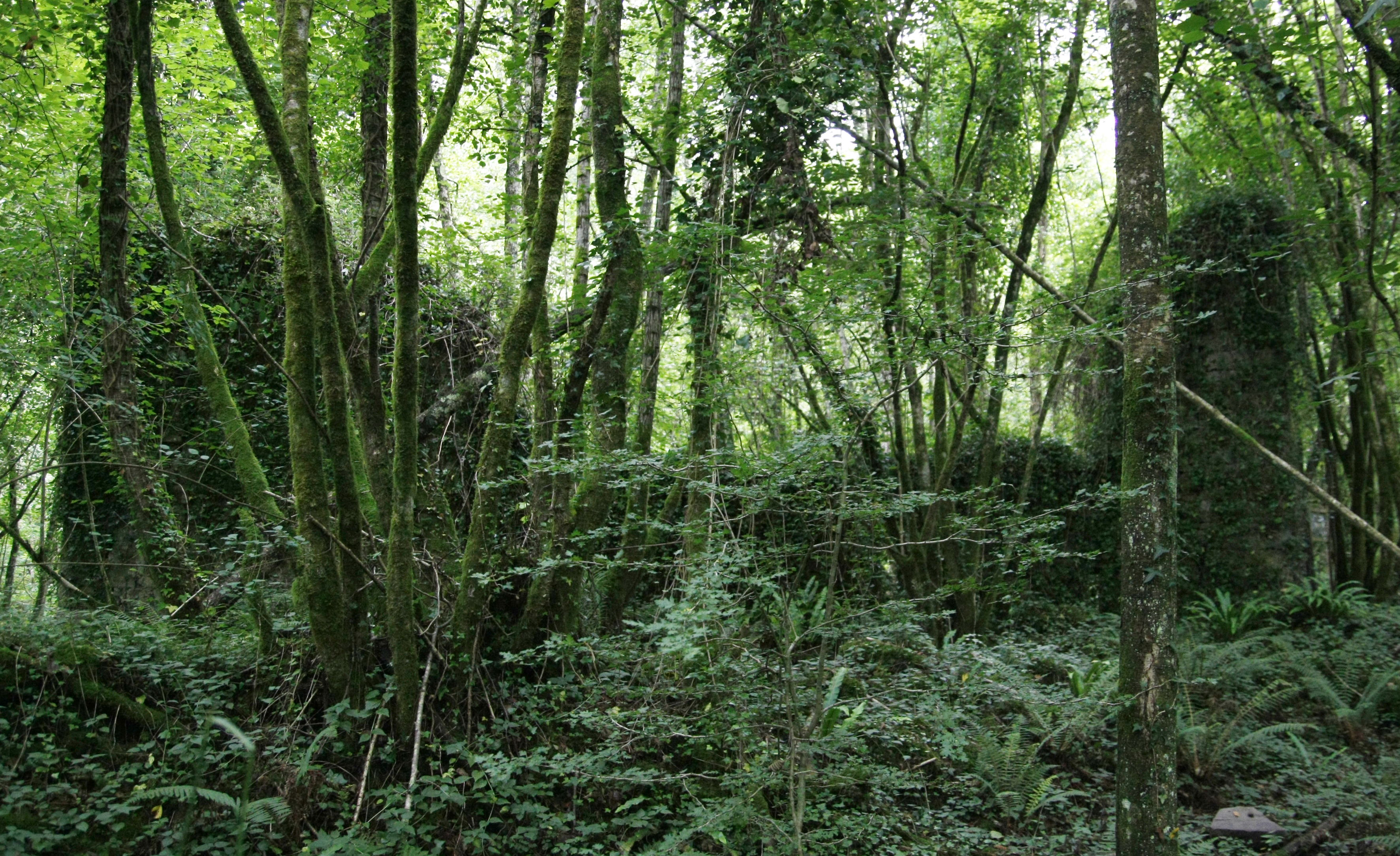 Ferrería de AtxulondoEuskara: Atxulondoko burdinola